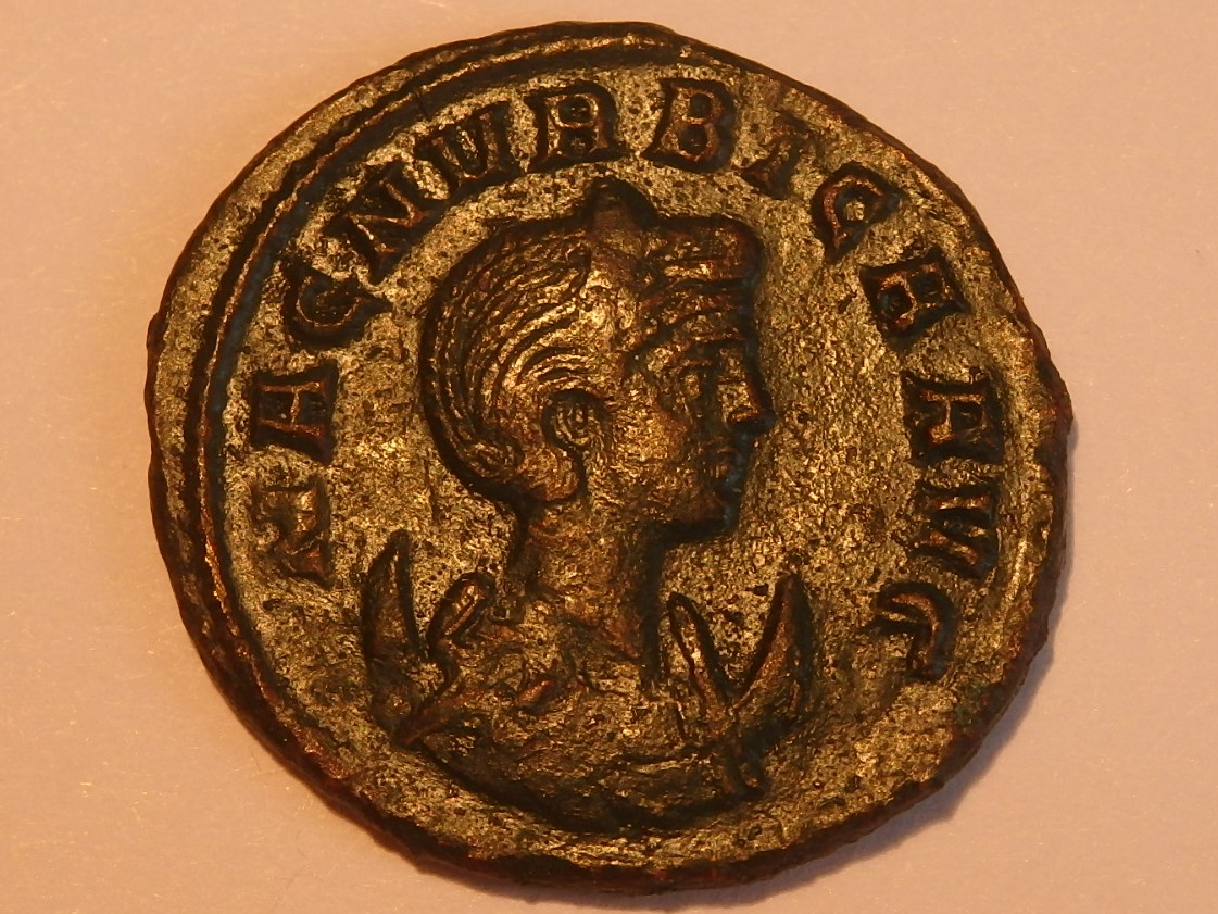 Magnia Urbica auf römischer Münze, Kampmann 116.7